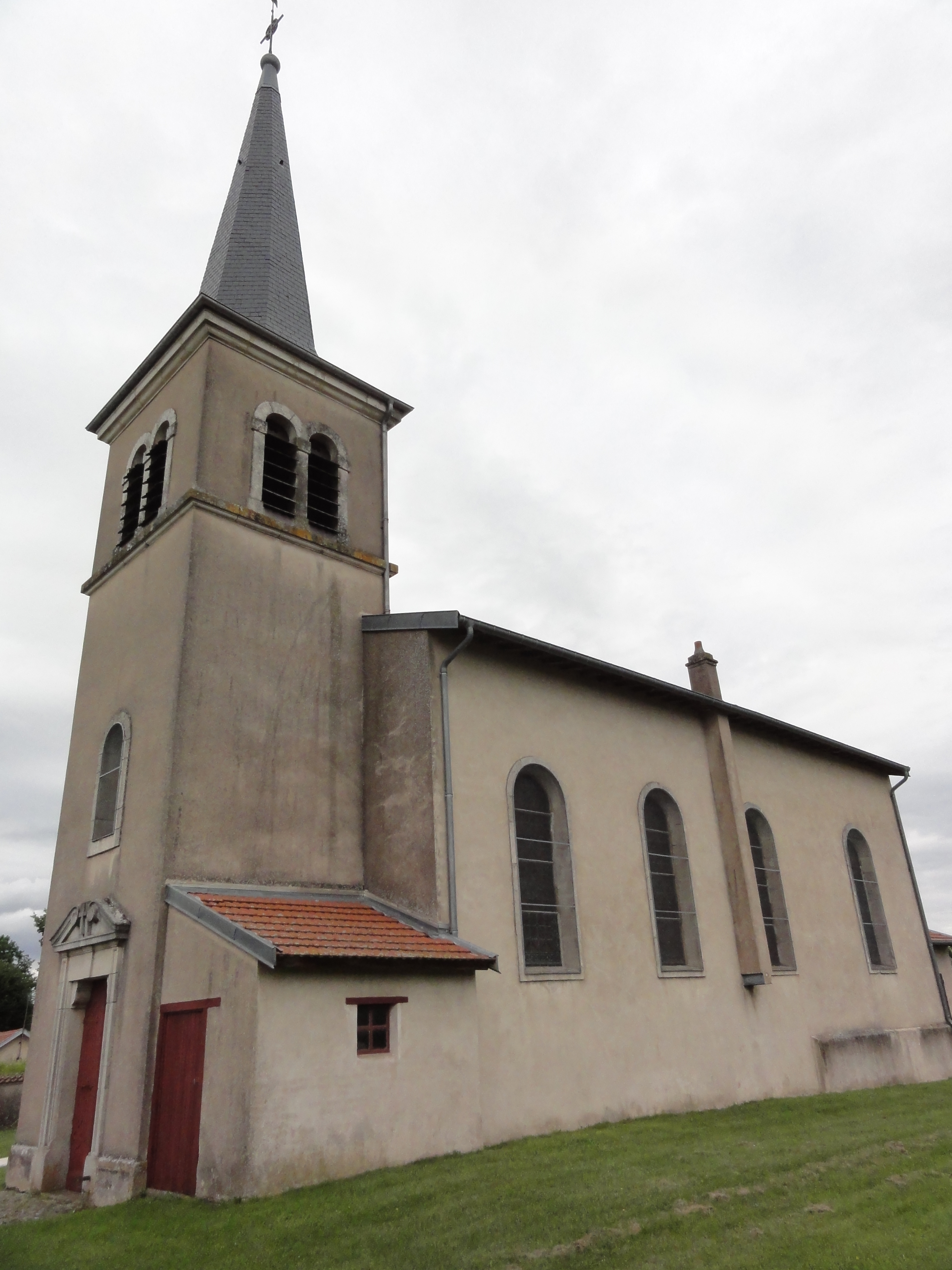 Erbéviller-sur-Amezule (M-et-M) église